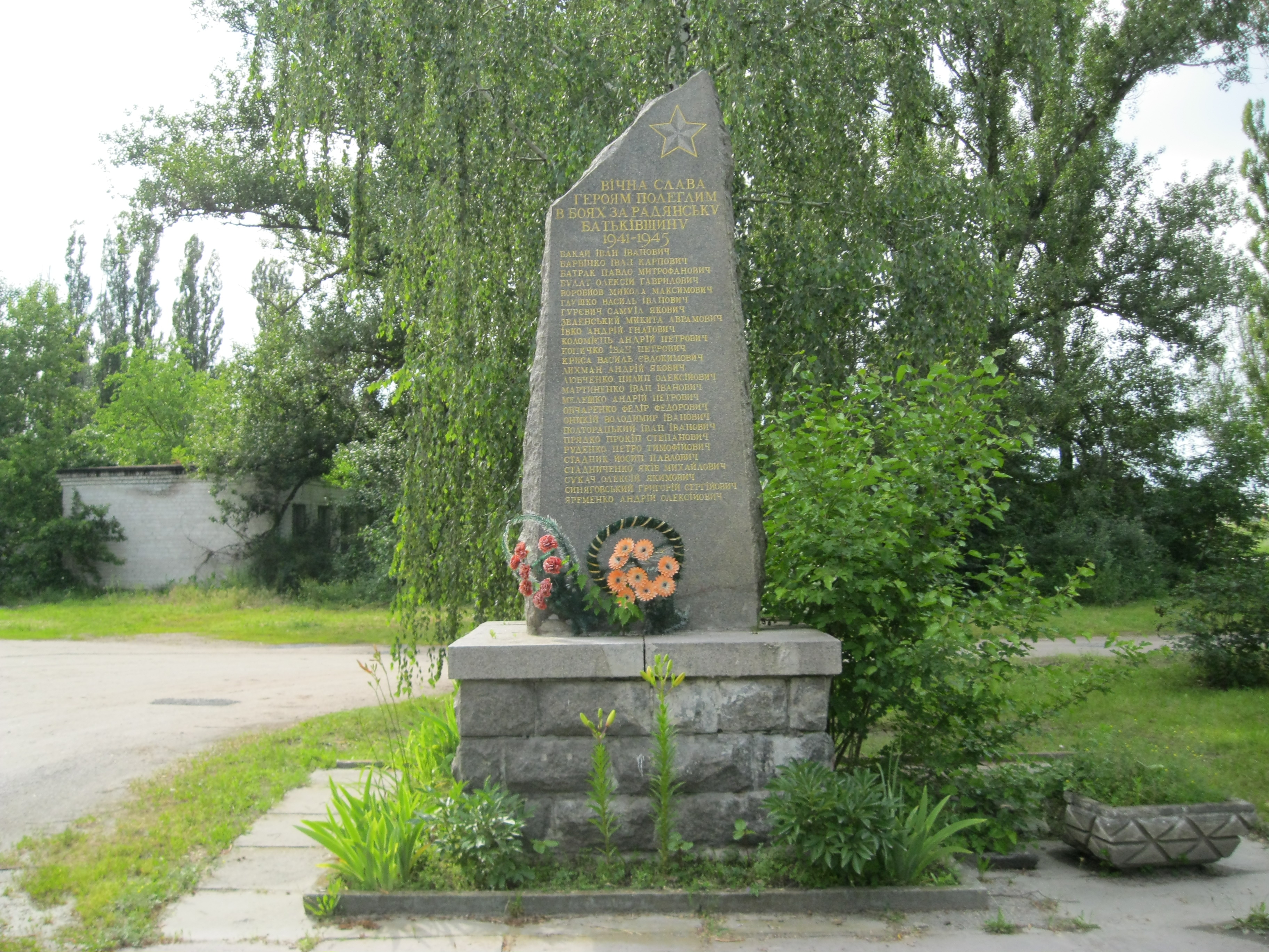 Пам'ятний знак робітникам об'єднання нерудних будівельних матеріалів, що загинули на фронтах Великої Вітчизняної війни, Кременчук, вул. Ярмаркова, 15